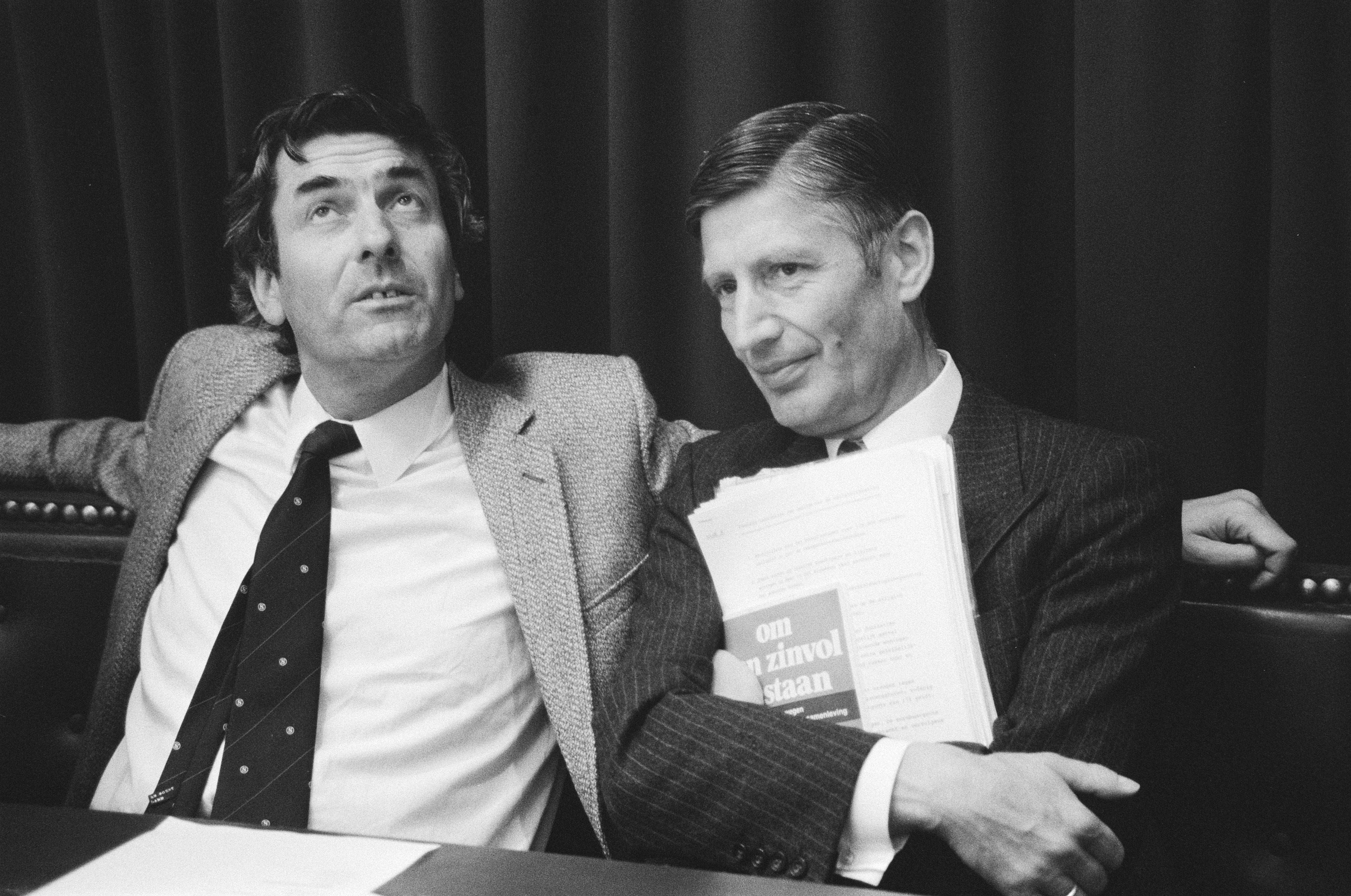 Collectie / Archief : Fotocollectie Anefo Reportage / Serie : [ onbekend ] Beschrijving : Vergadering over Bouw-CAO in Woerden; de heer G. J. Tiemstra (AVBB) wordt begroet door de heer L. Brouwer (FNV), links Datum : 23 juni 1981 Trefwoorden : Vergaderingen Persoonsnaam : Avbb, Brouwer L., G. J. Tiemstra Instellingsnaam : FNV Fotograaf : Dijk, Hans van / Anefo Auteursrechthebbende : Nationaal Archief Materiaalsoort : Negatief (zwart/wit) Nummer archiefinventaris : bekijk toegang 2.24.01.05 Bestanddeelnummer : 931-5584